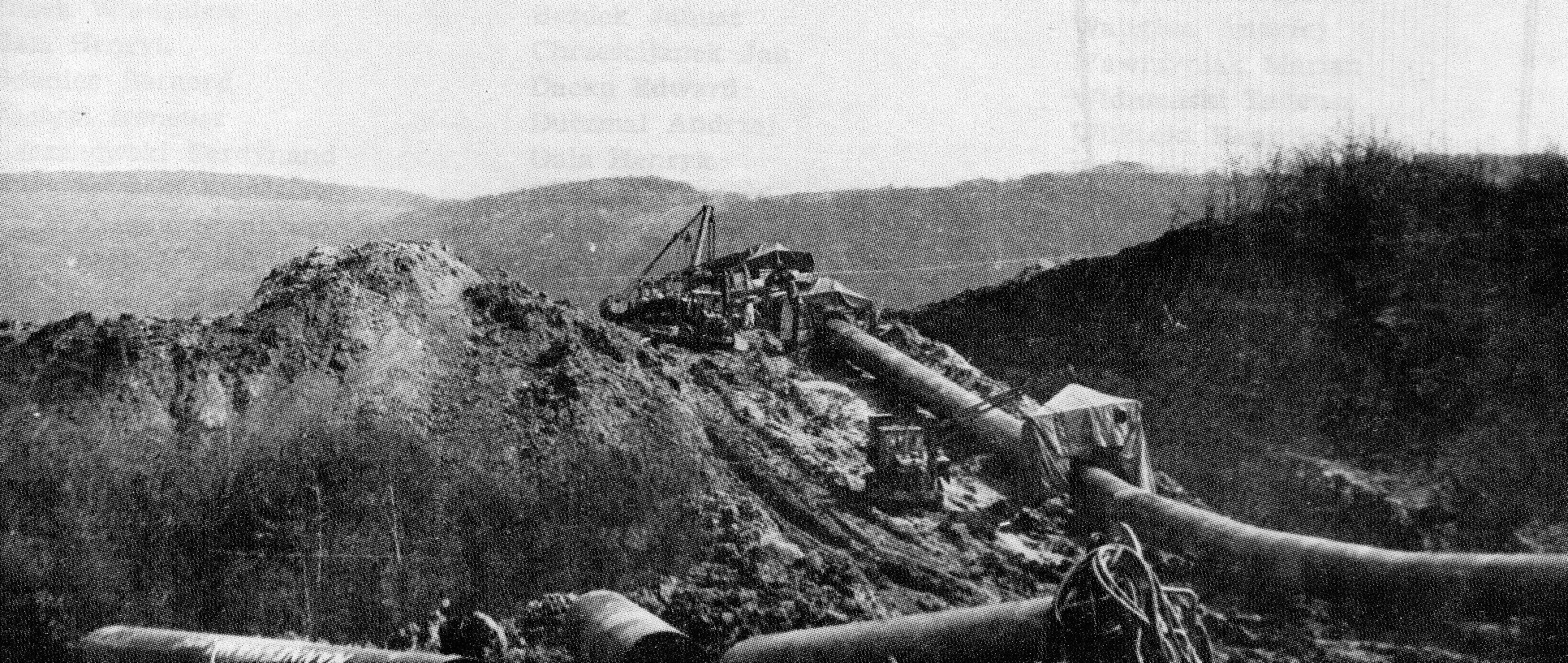 Budowa gazociągu Urengoj-Użhorod. Ok. 1984r.